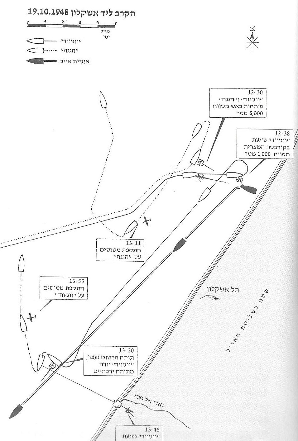 תרשים קרב מול חוף אשקלון 19 אוקטובר 1948